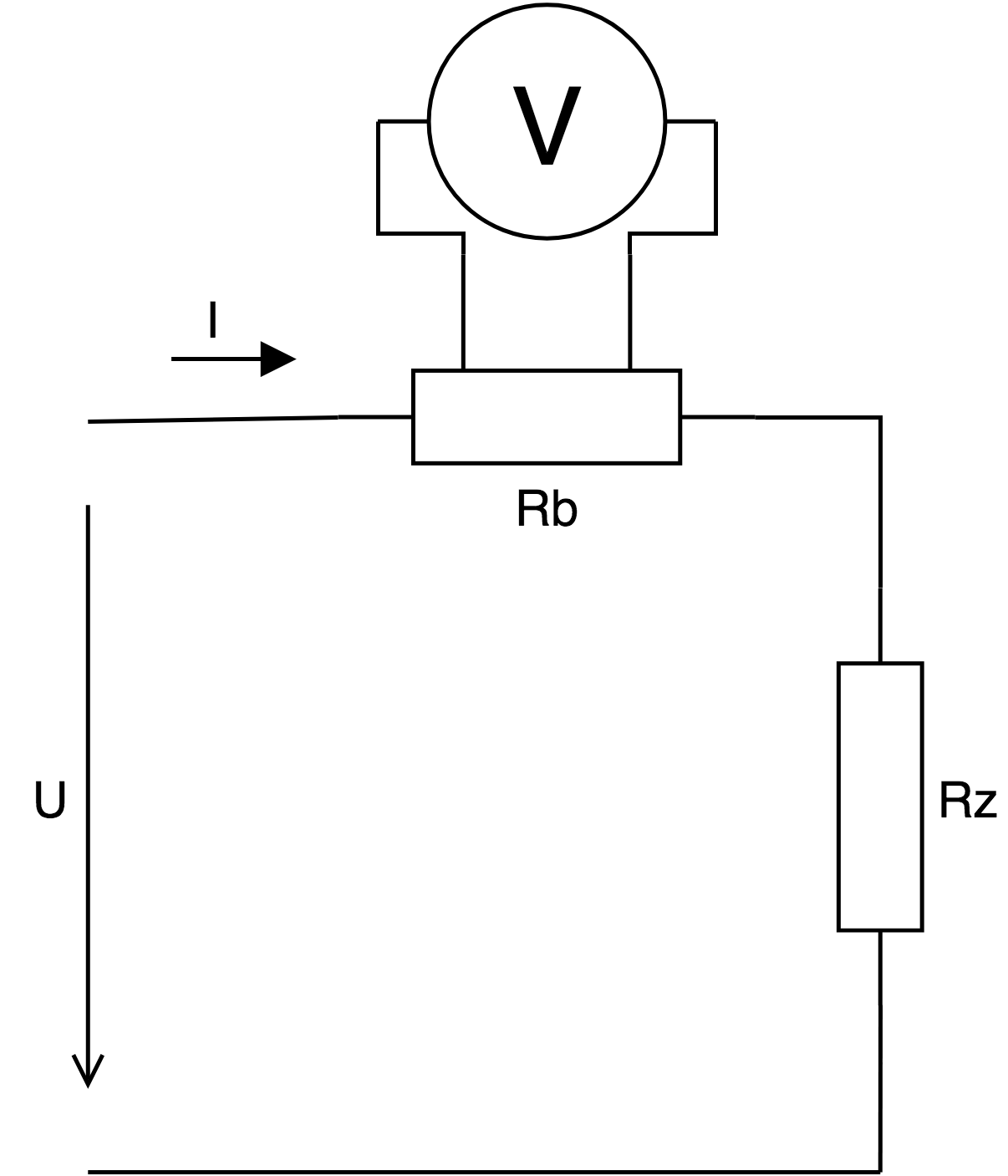 Bočník v jednoduchém obvodu se zatěžovacím rezistorem